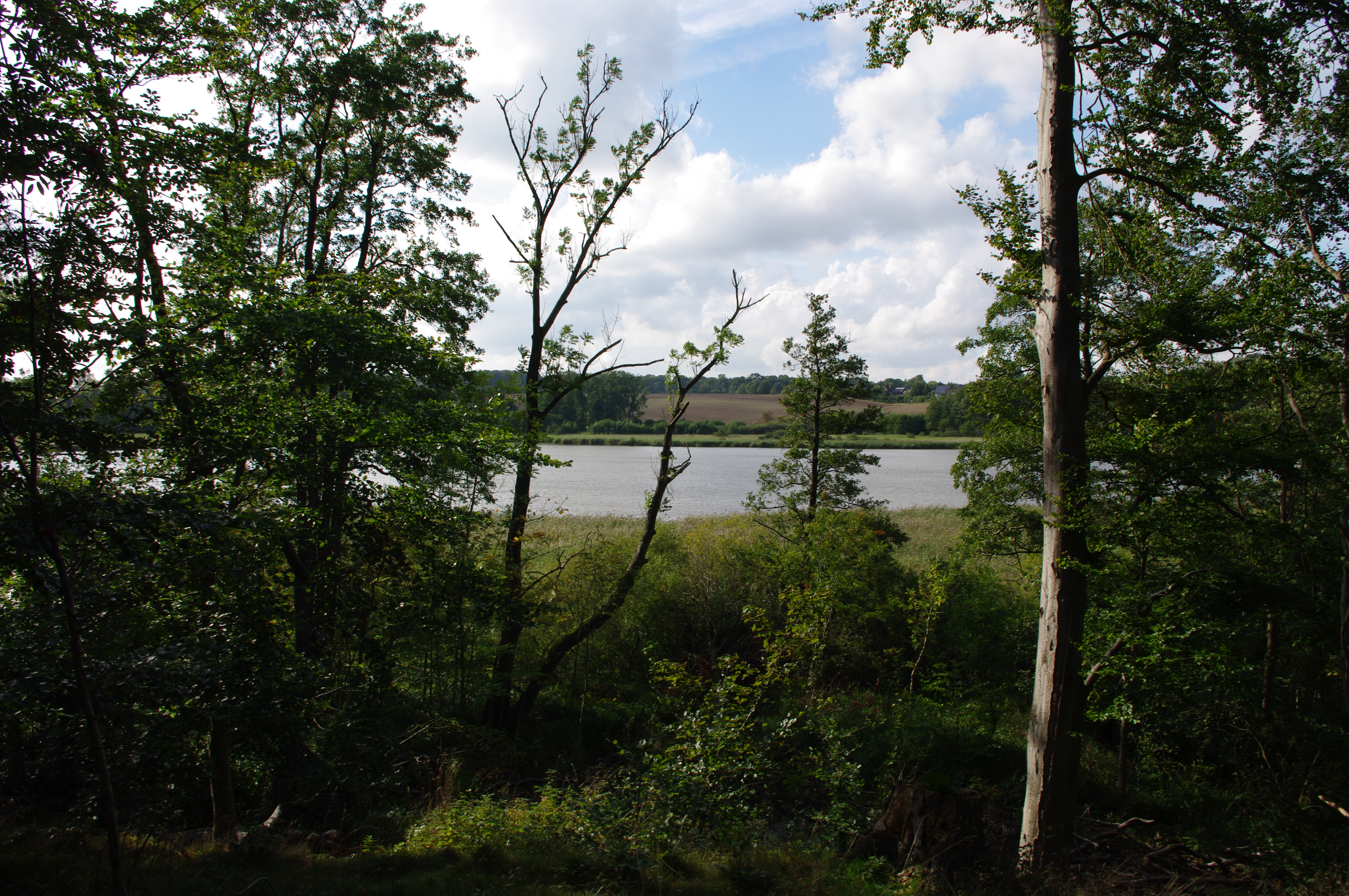 Landschaftsschutzgebiet „Küstenlandschaft Dänischer Wohld“: Der Goossee aus Osten betrachtet.